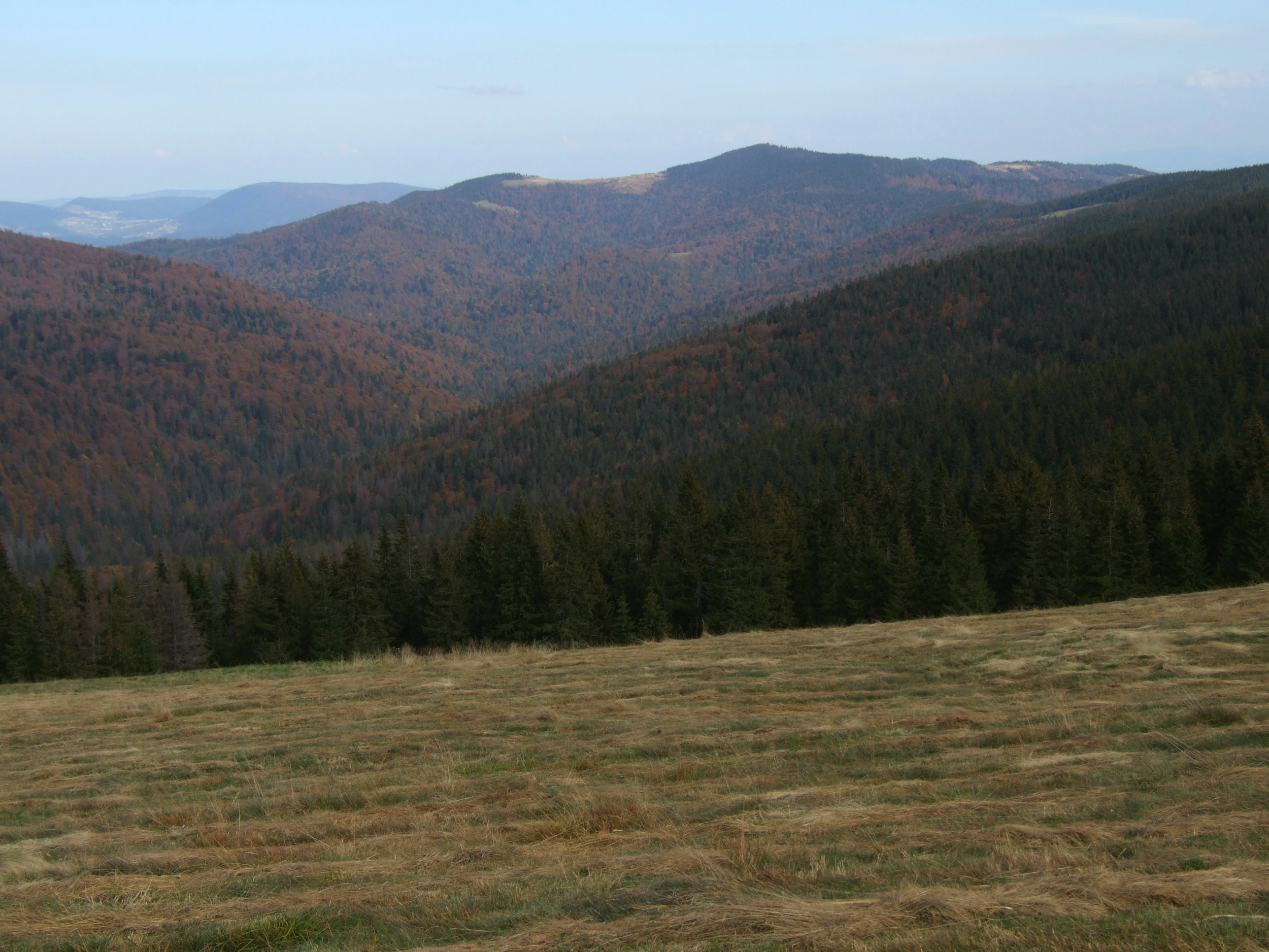 Gorc, widok z Jaworzyny Kamienickiej (Gorce)